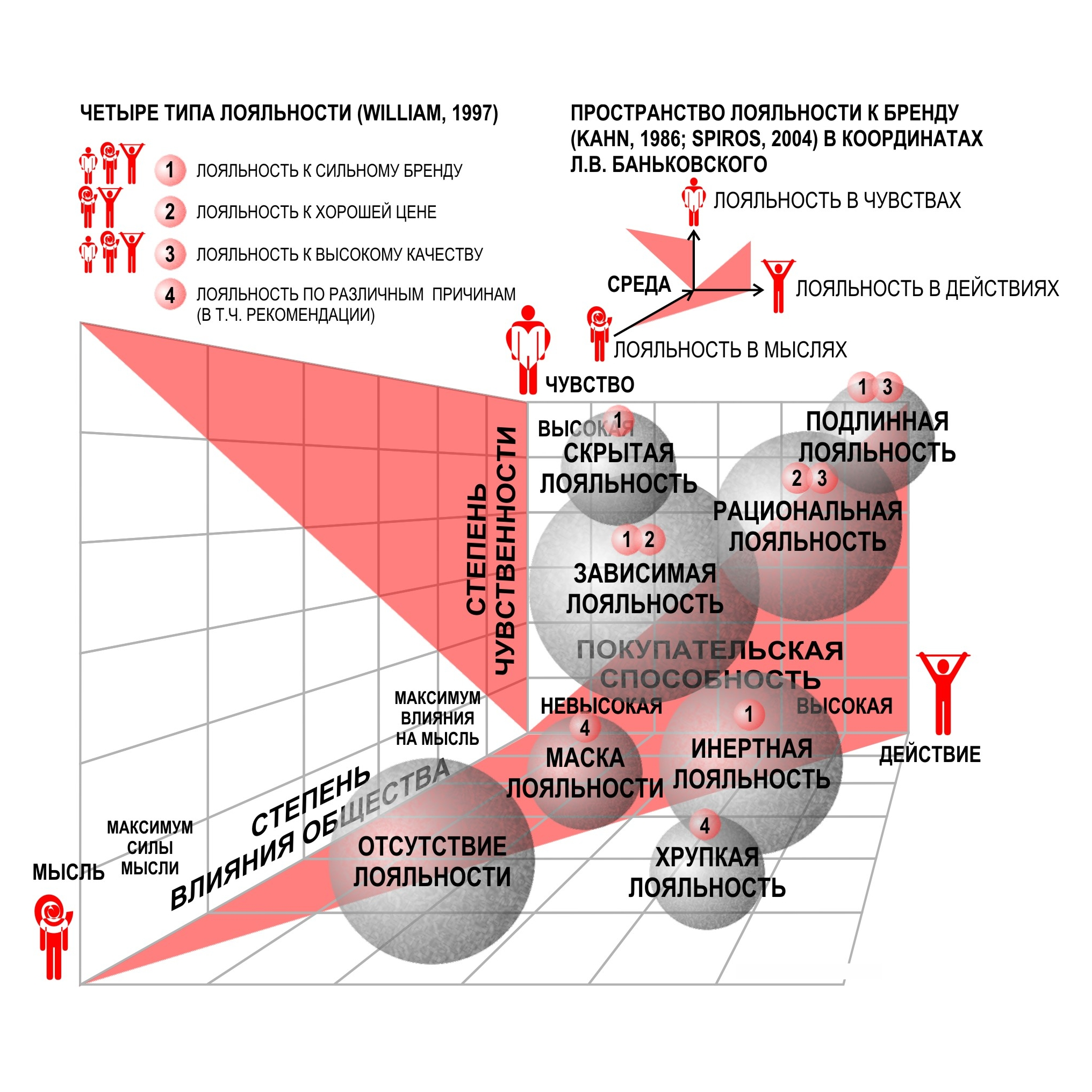 Пространство лояльности к брендам (brand loyalty) в координатах бренд-культуры. Для статьи "Лояльность к бренду"